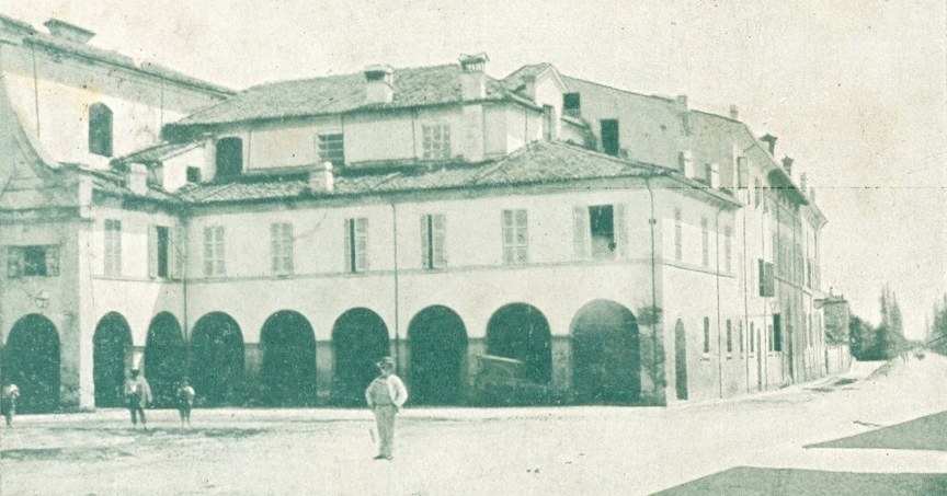 La Regia Pretura di Mirandola, situata nel palazzo dell'ex Ospedale dei Battuti in piazza del Duomo, demolito nel 1929 per la costruzione della caserma Mussolini (Palazzo della Milizia - MSVN)